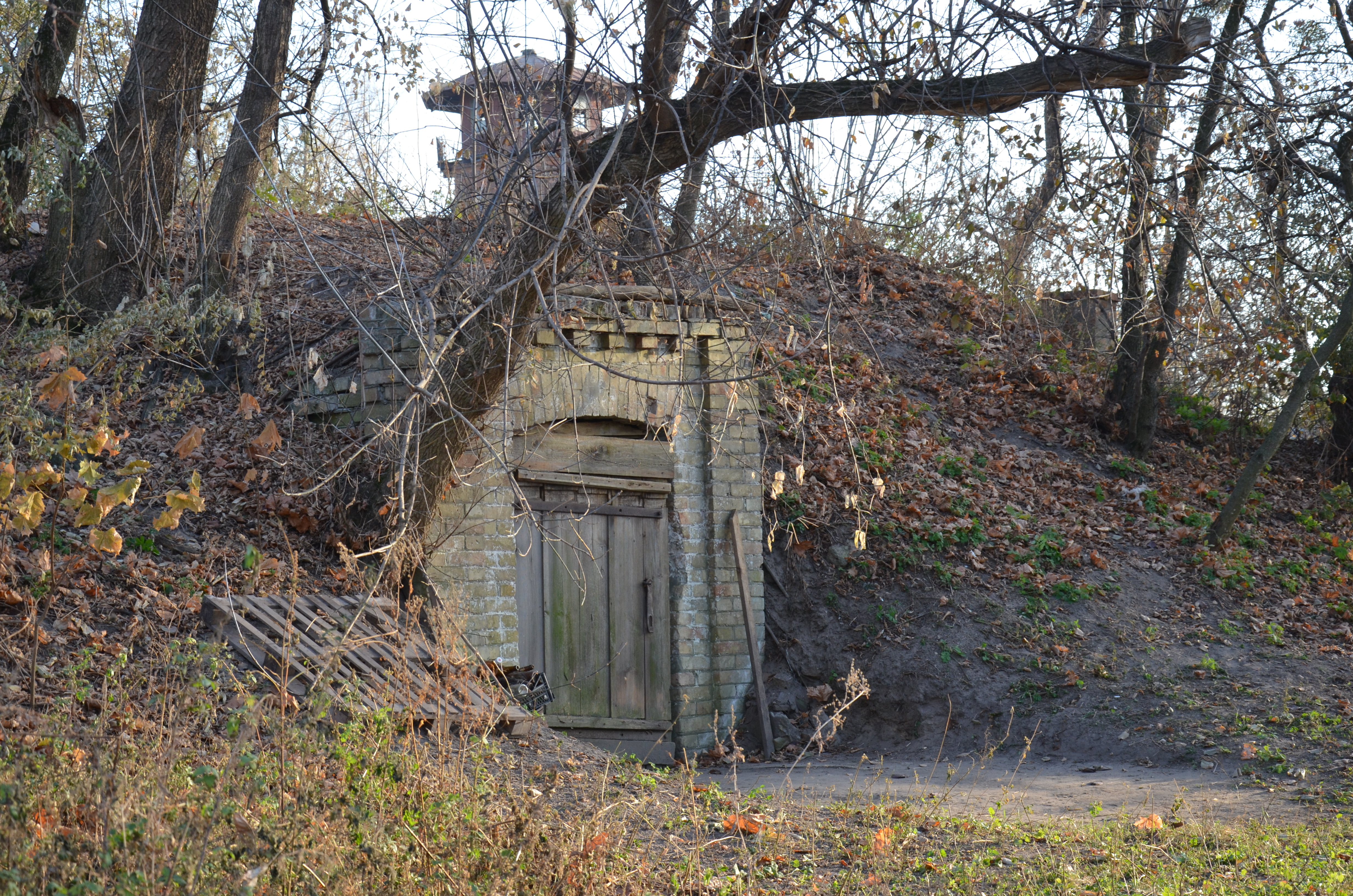 Парк-пам'ятка садово-паркового мистецтва садиби І.М. Терещенка (16,0 га), село Шпитьки